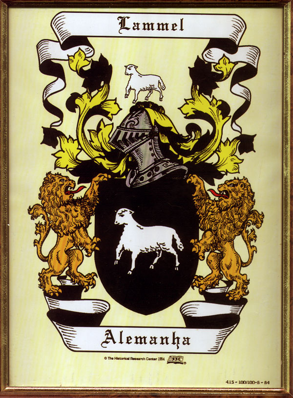 Brasão de Armas da Família Lammel